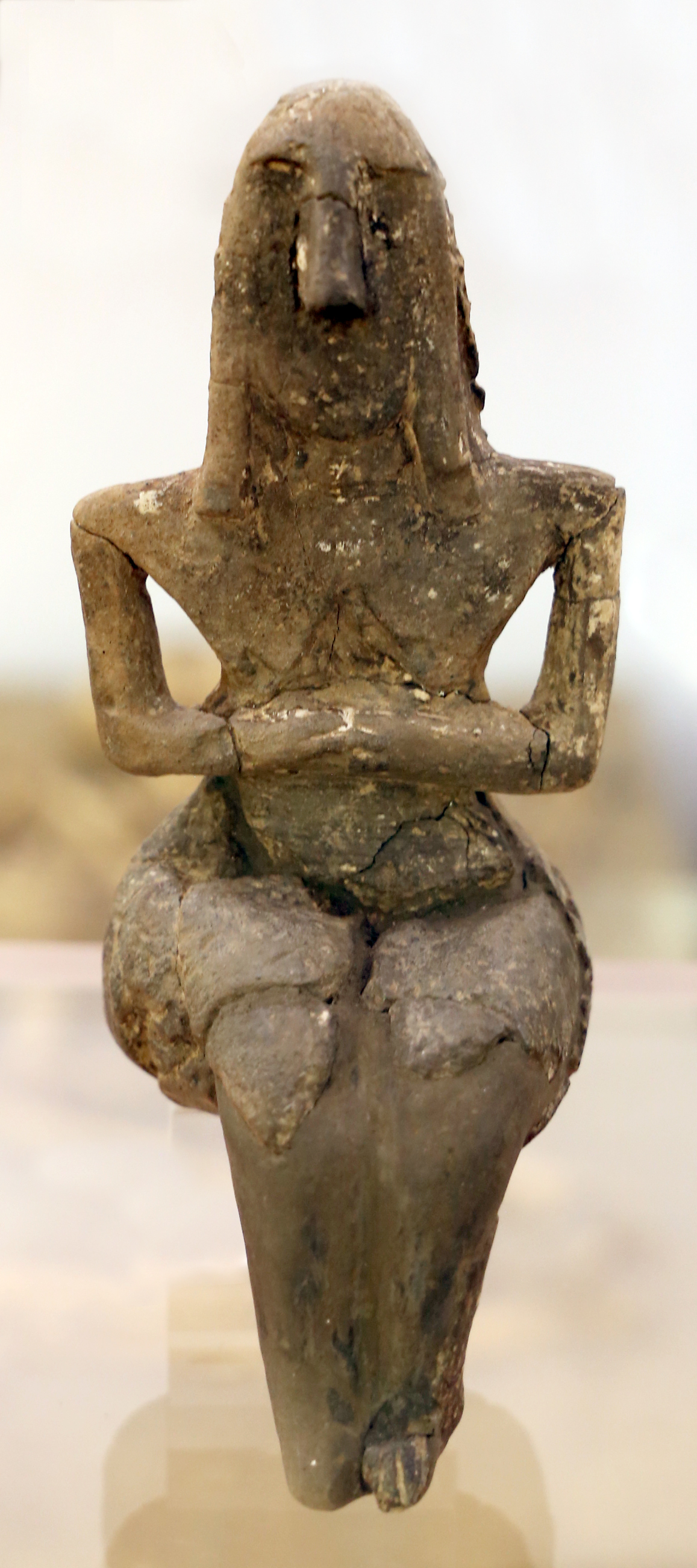 Museo archeologico nazionale (Parma) This is a photo of a monument which is part of cultural heritage of Italy.